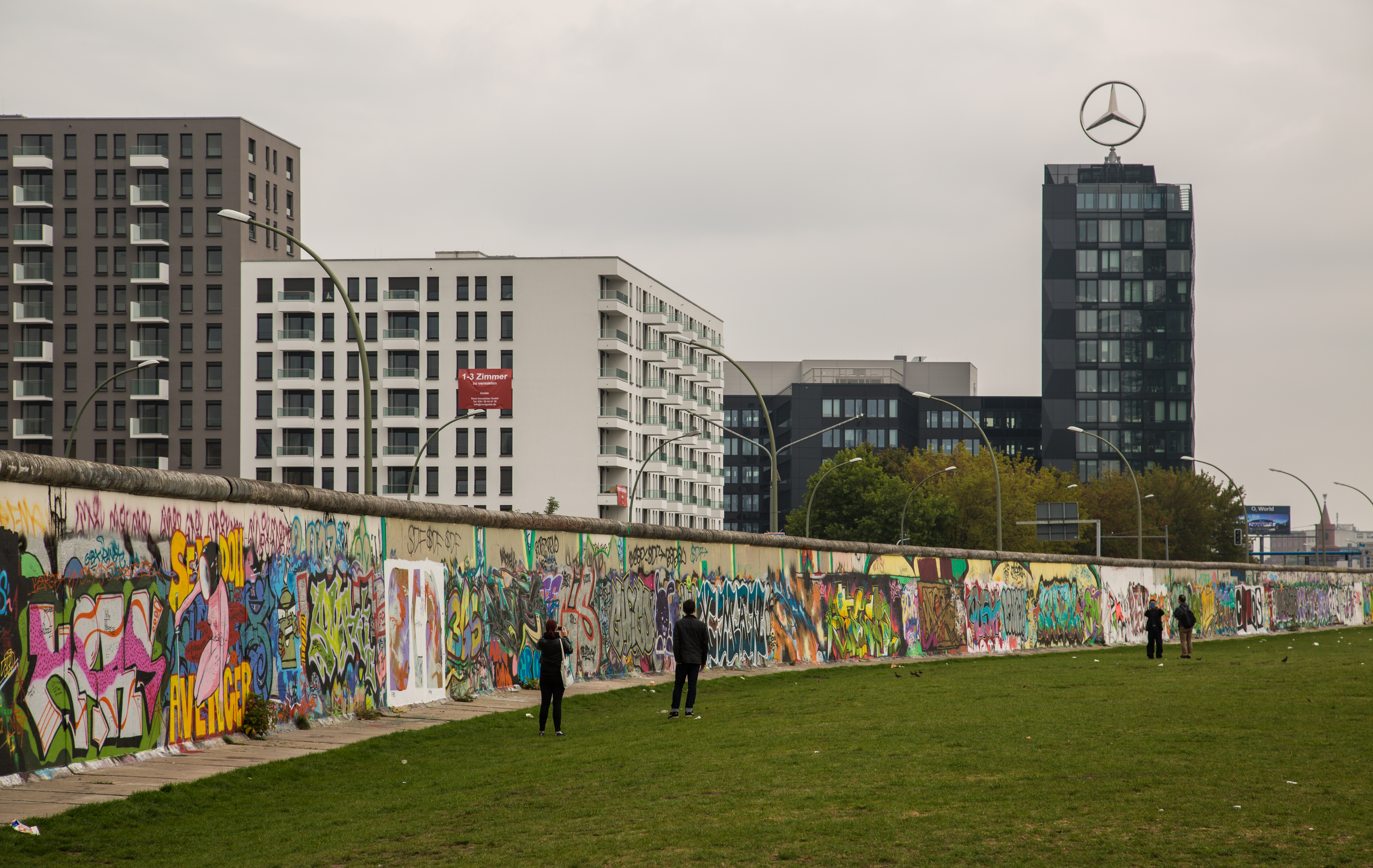 Berlin Wall